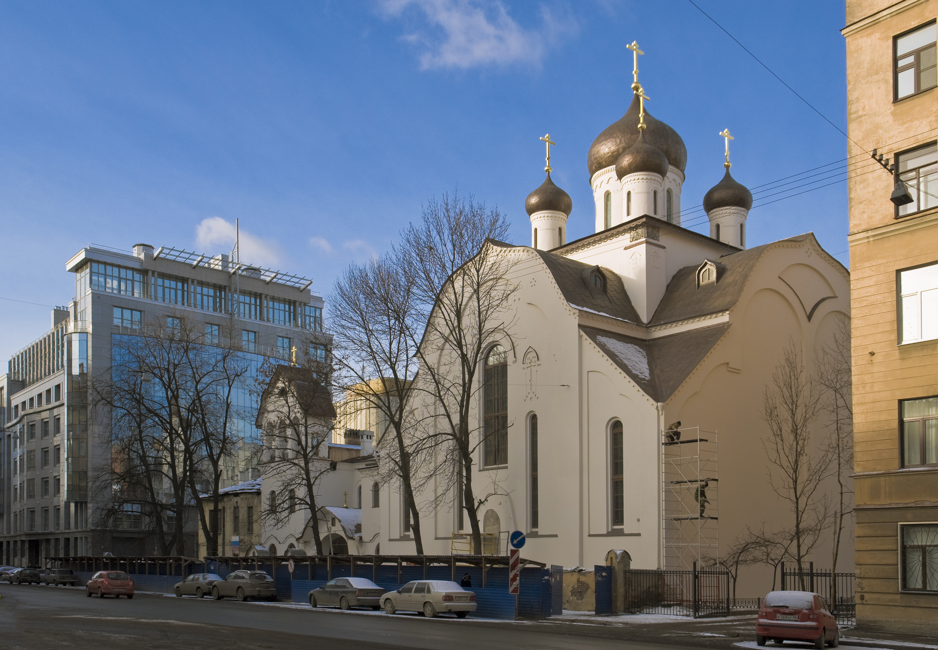 Церковь Знамения Пресвятой Бородицы (Тверская улица, Санкт-Петербург)